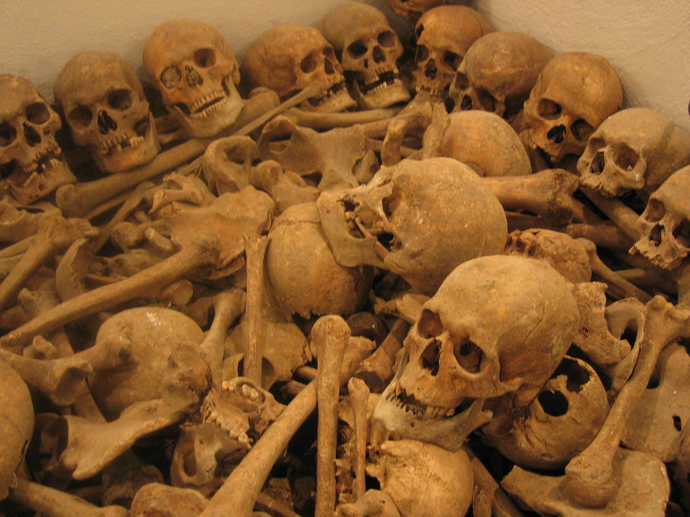 Kości v krypcieSlovenčina: Kosti v krypte